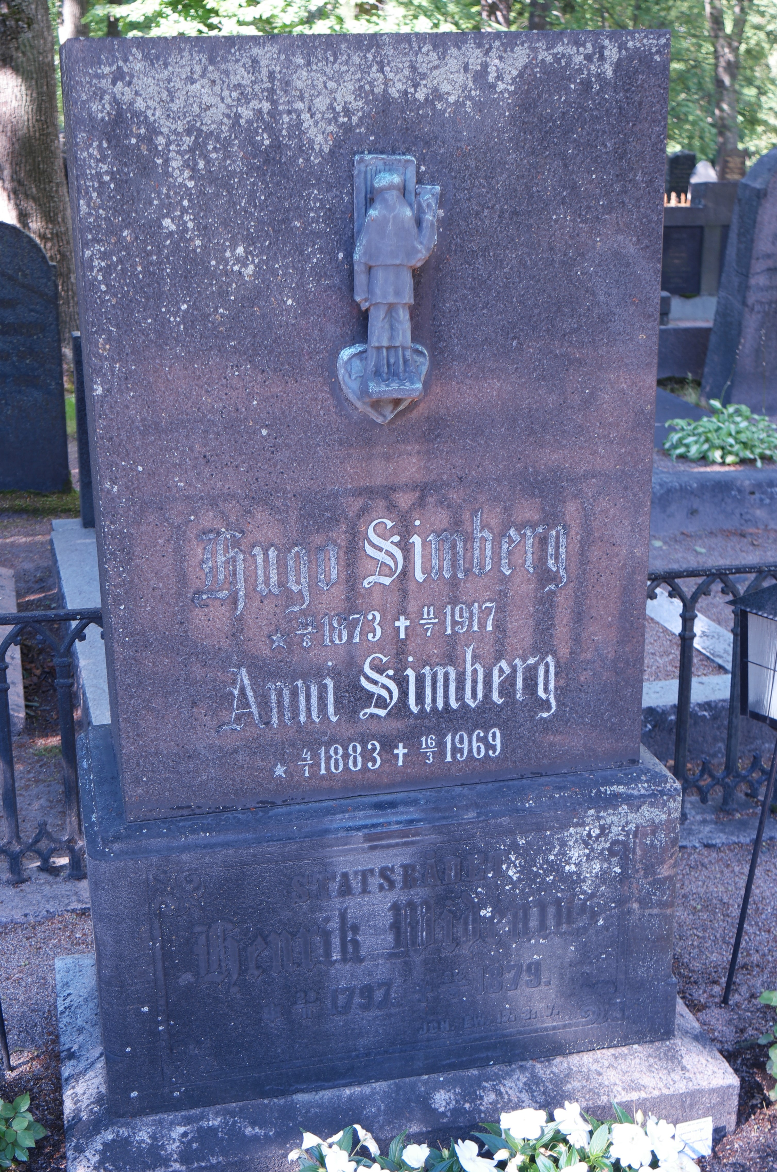 Grab des finnischen Malers und Graphikers Hugo Simberg (1873-1917) auf dem Friedhof Hietaniemi in Helsinki